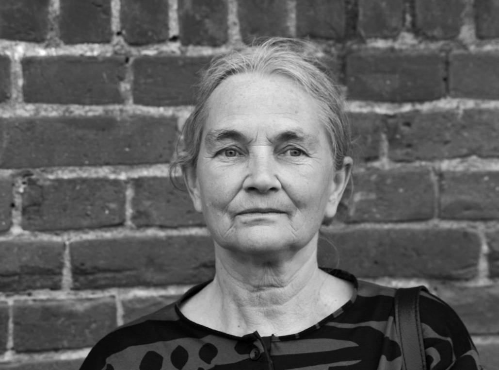 Die Bildhauerin Marguerite Blume-Cárdenas während einer Ausstellungseröffnung in Börsicke.